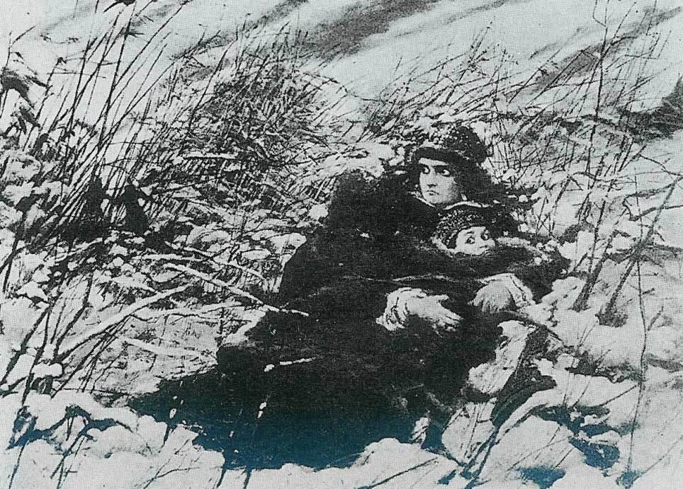 Maryna Mniszchówna w ucieczce przed pogonią